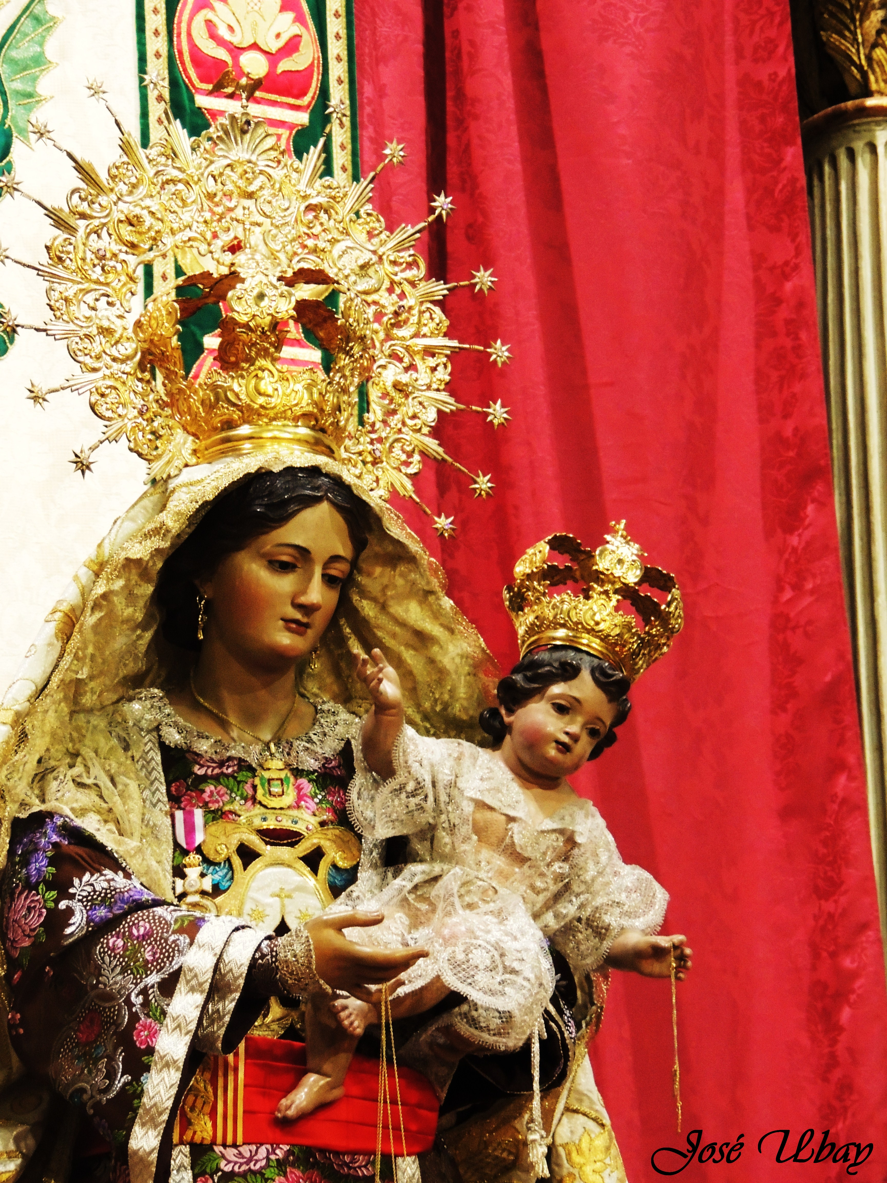 Nuestra Señora del Monte Carmelo Coronada. Siglo XIX. Fernando Estévez de Salas. Parroquia de san Juan Bautista. Villa de la Orotava. Tenerife.